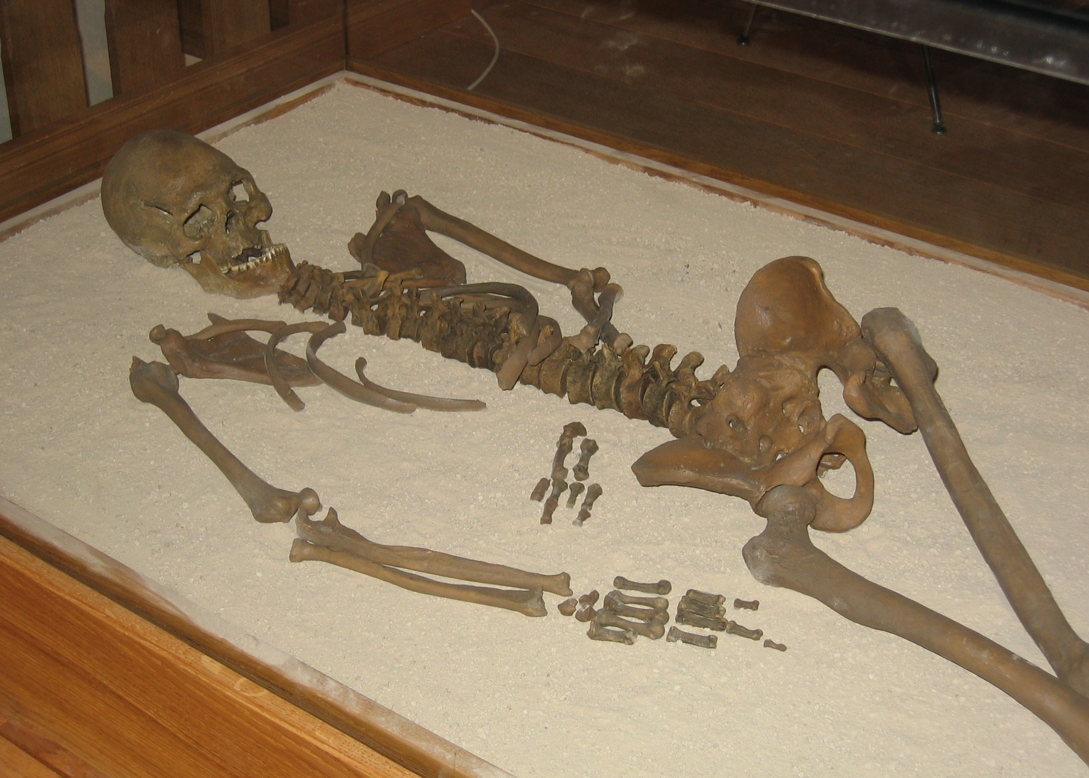 Der Loschburmann in Echternach Der Loschburmann (rund 8.000 Jahre alt): Die Fundstelle Loschbour, Gemeinde Heffingen, befindet sich im Müllerthal, ca. 20 km nordöstlich von Luxemburg in Richtung Junglinster und weiter an der Strasse in Richtung Grundhof an der Sauer. Der Fundplatz befindet sich unter einem Felsüberhang, einem sogenannten Abri. Namensgebend war der kleine Bach „der Loschbour", der in nächster Nähe in die schwarze Ernz fließt. Eine Mühle, "die Reuländer Mühle" liegt ca. 1,5 km stromaufwärts und wie der Abri, auf der linken Seite der schwarzen Emz und der Straße.